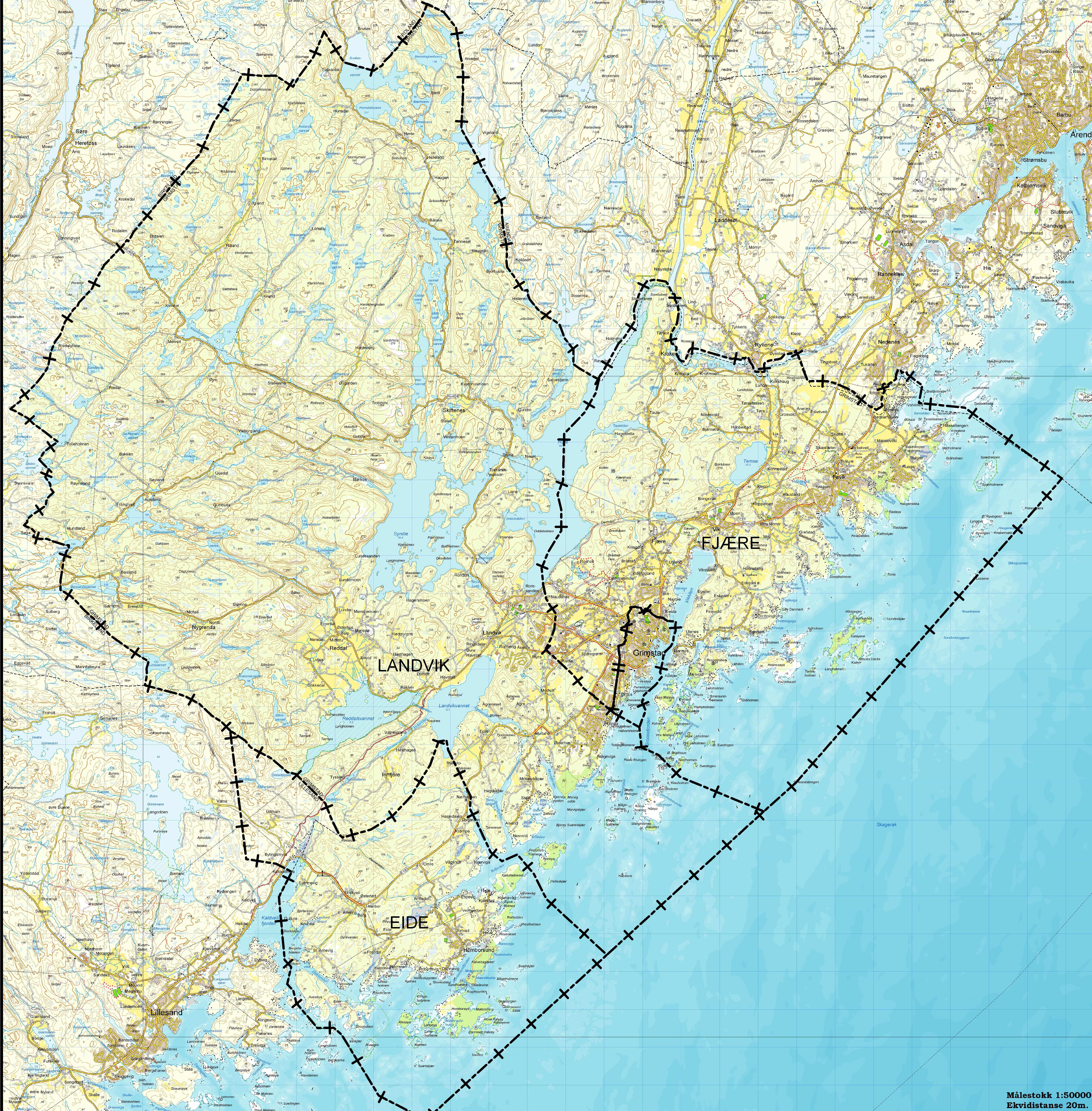 Grimstak kommune, med gamle kommunegrenser for Fjære, Landvik og Eide kommuner.